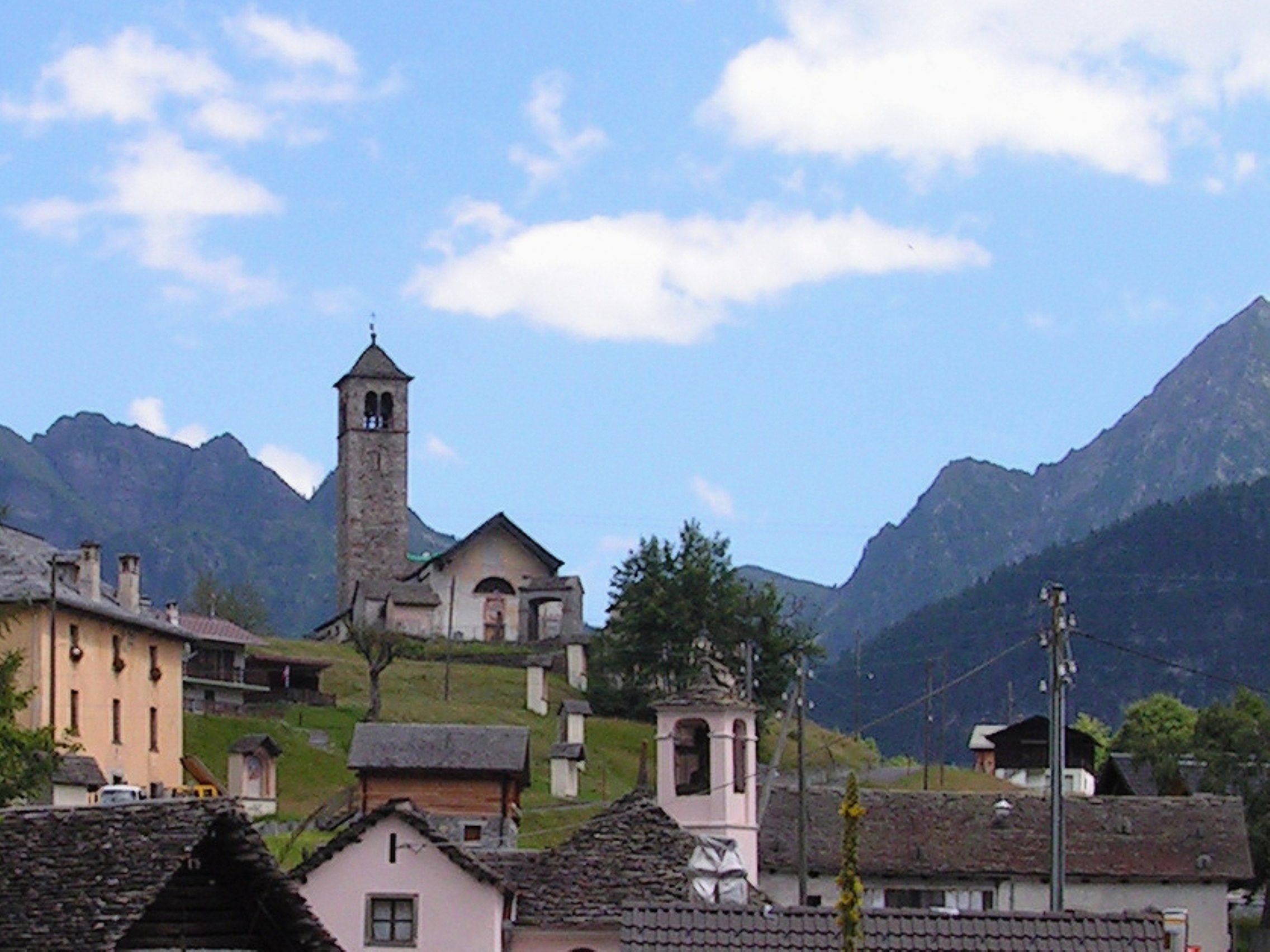 Campo Vallemaggia. Église San Bernardo. File:Campo eglise 2011-07-11 14 35 46 PICT3329.JPG recadrée.